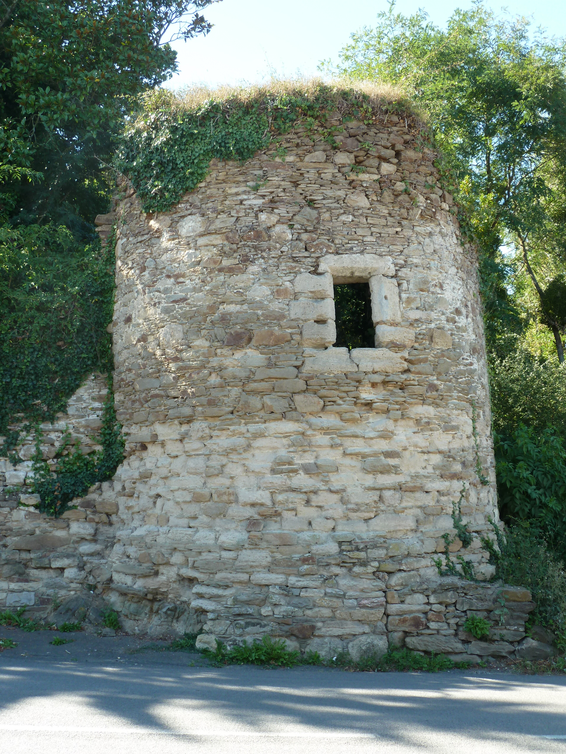 Vestige de l'ancien château de Campbon La Tour d'enfer